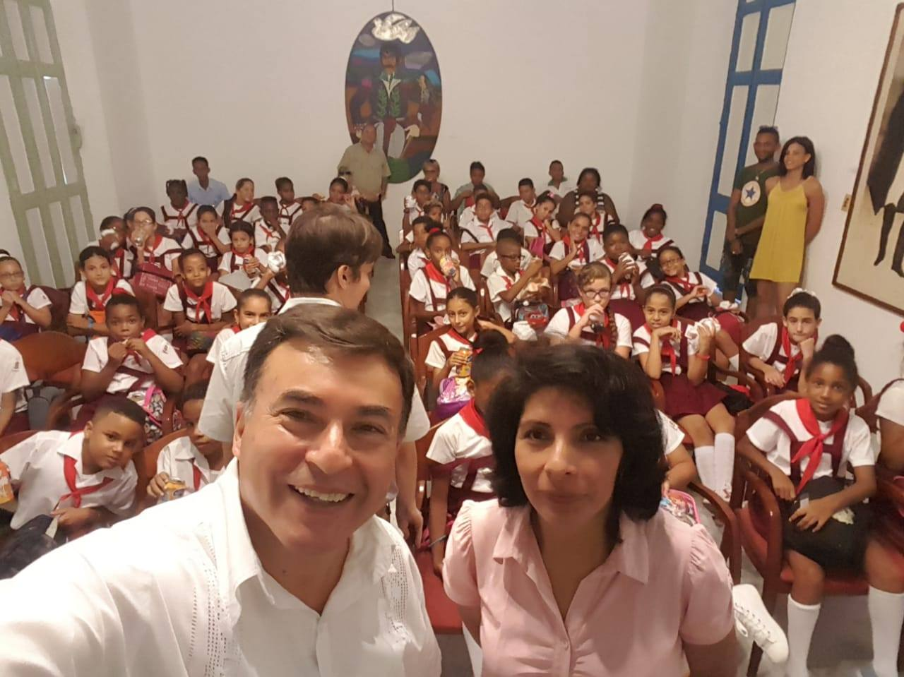 Juan Ramón Quintana y Alidson Gomez Agostopa en una escuela publica de la Republica de Cuba en 2018.